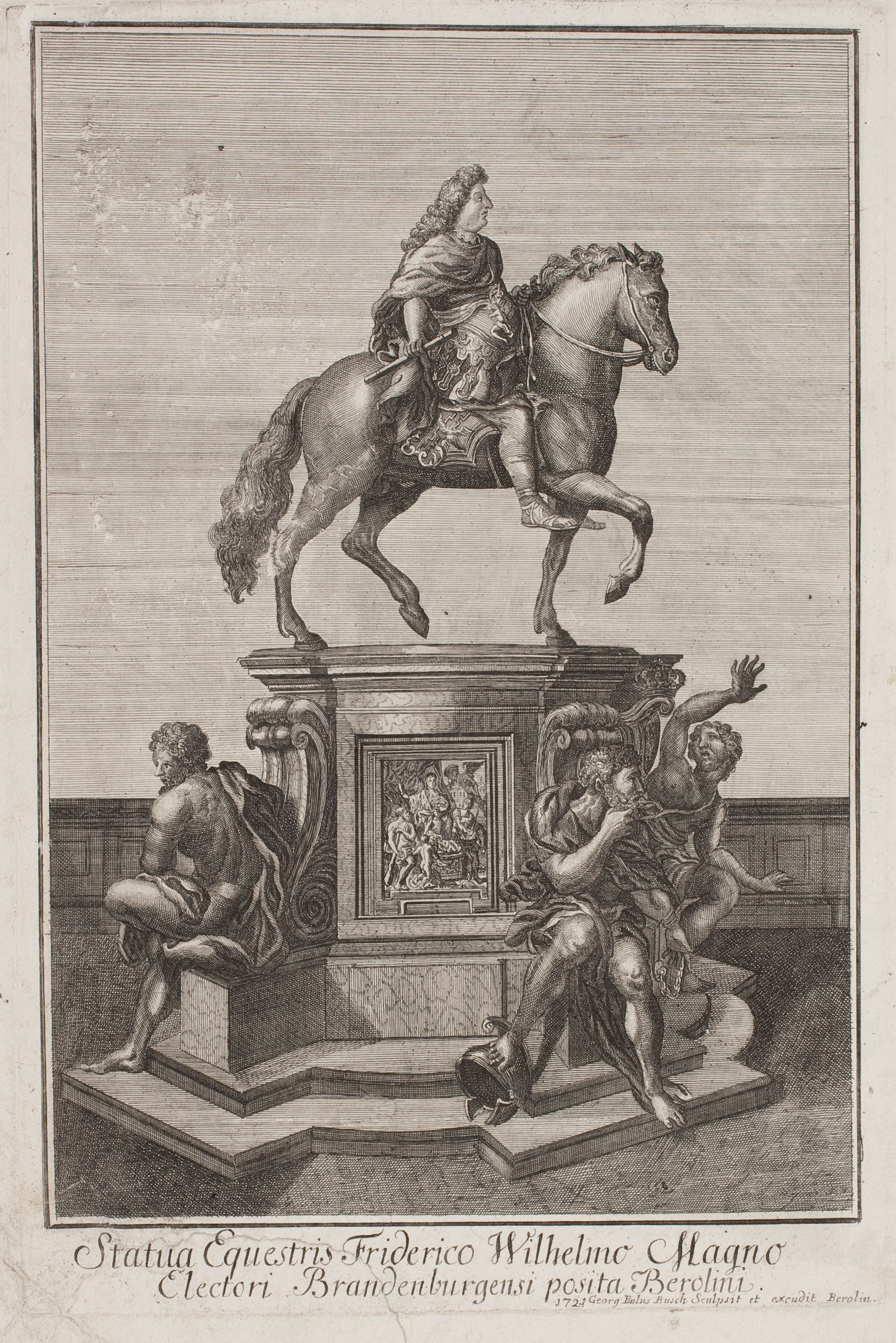 Statue des Großen Kurfürsten Friedrich Wilhelm in Berlin von Andreas Schlüter; Kupferstich, Radierung. 27.9 cm x 18.5 cm (Platte)